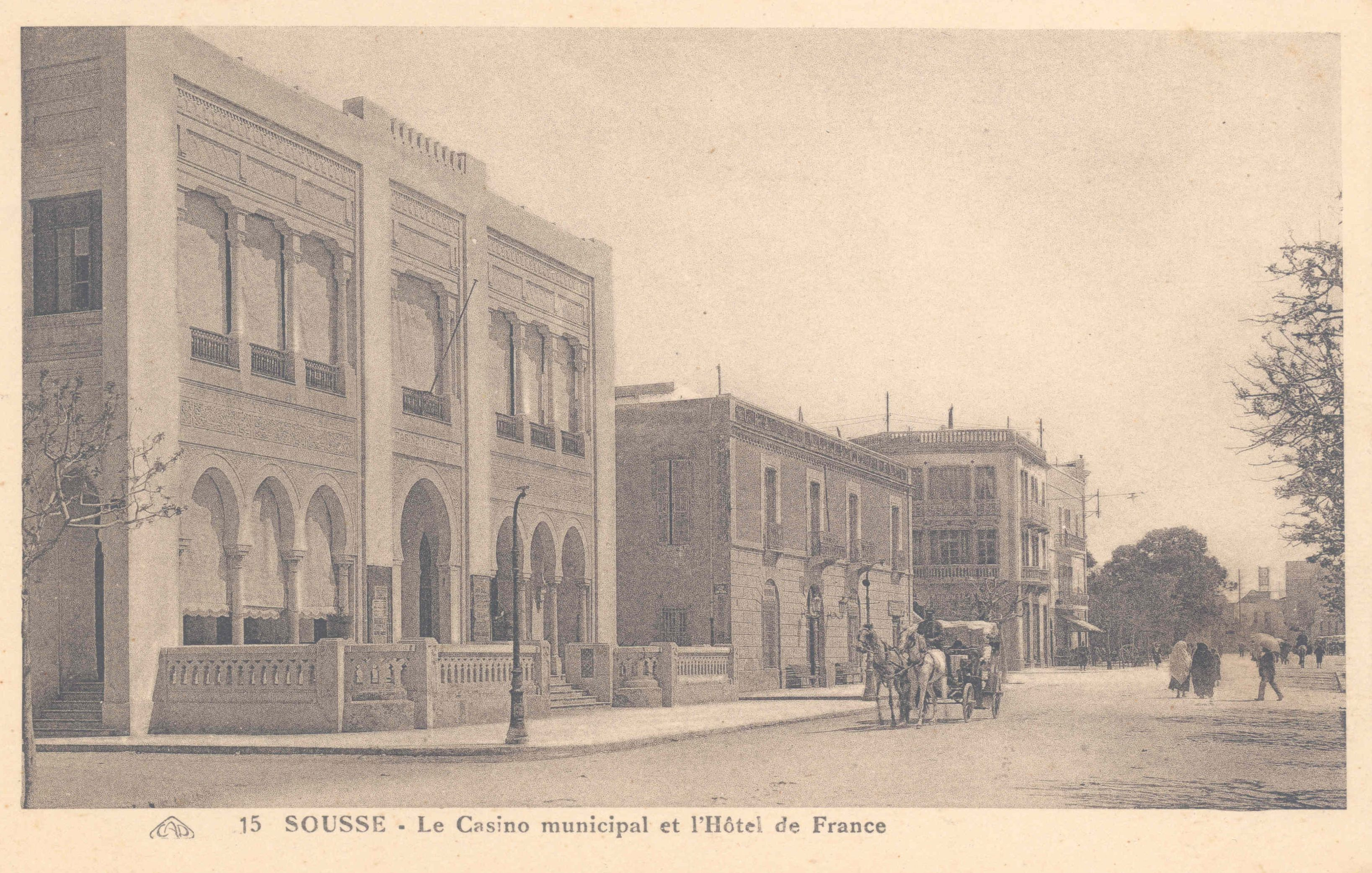 Le casino municipal et l'Hôtel de France à Sousse vers 1920